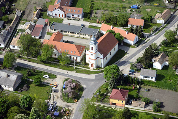 Légi fotó Kömlődről